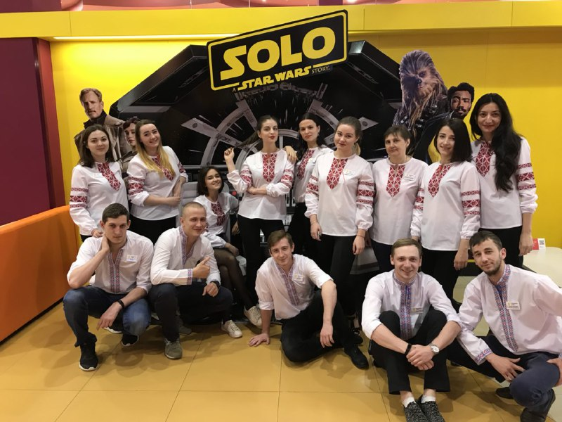 День вишиванки у Планета Кіно